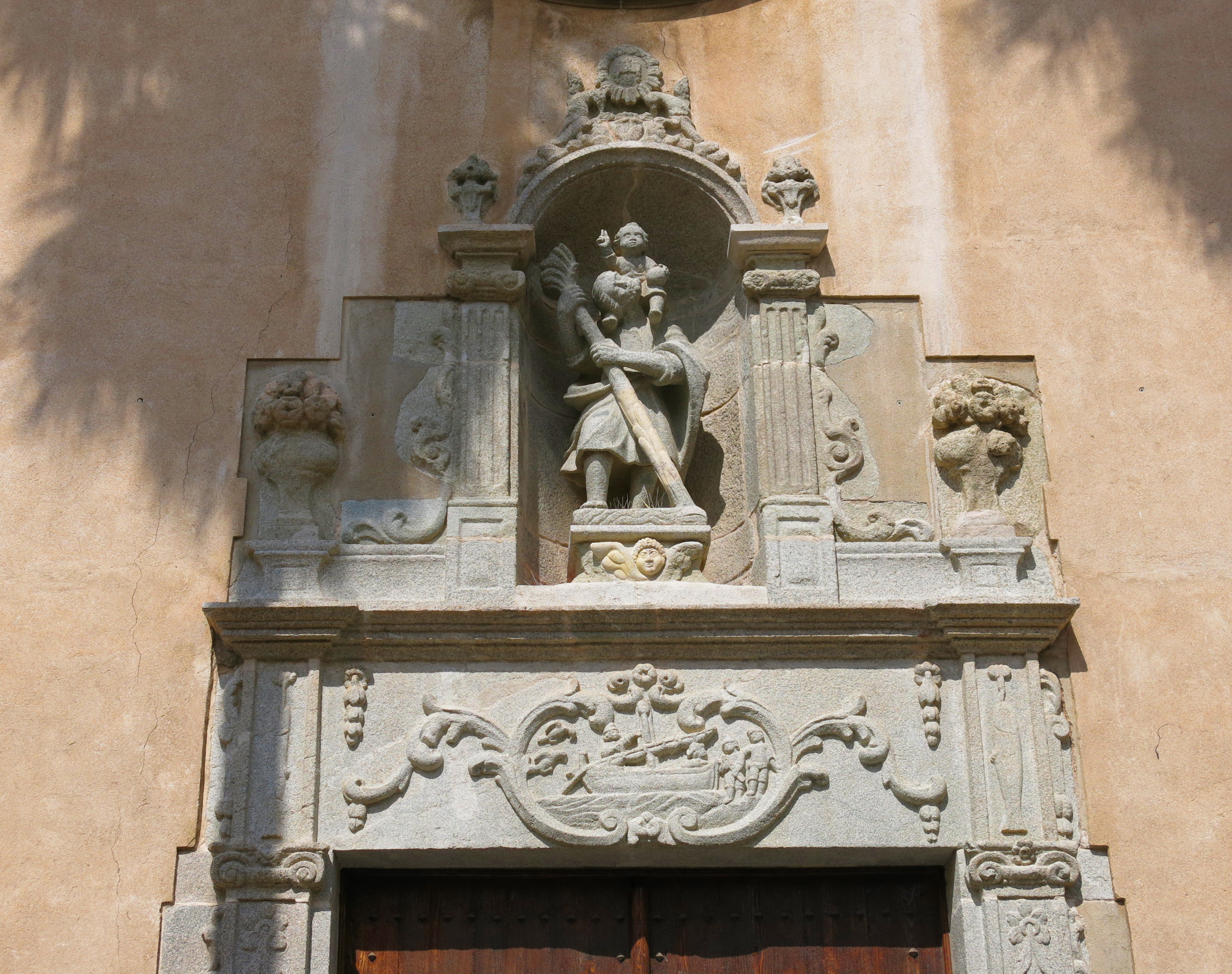 Església parroquial de Sant Cristòfol de Premià (Premià de Mar)